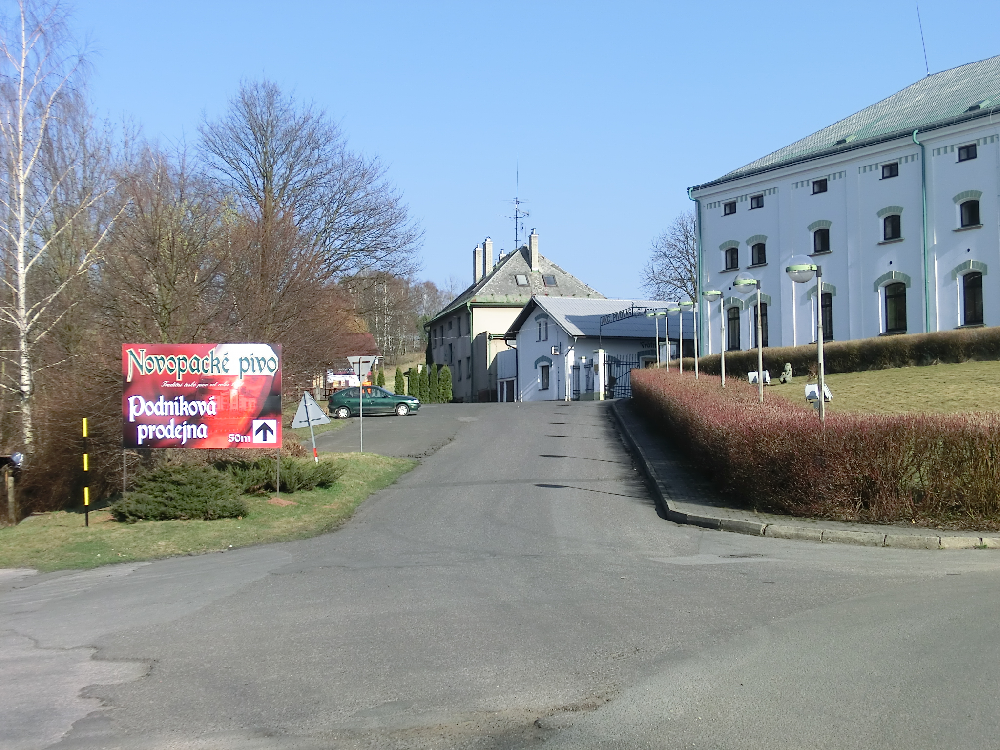 Vjezdová komunikace novopackého pivovaru včetně reklamní cedule.